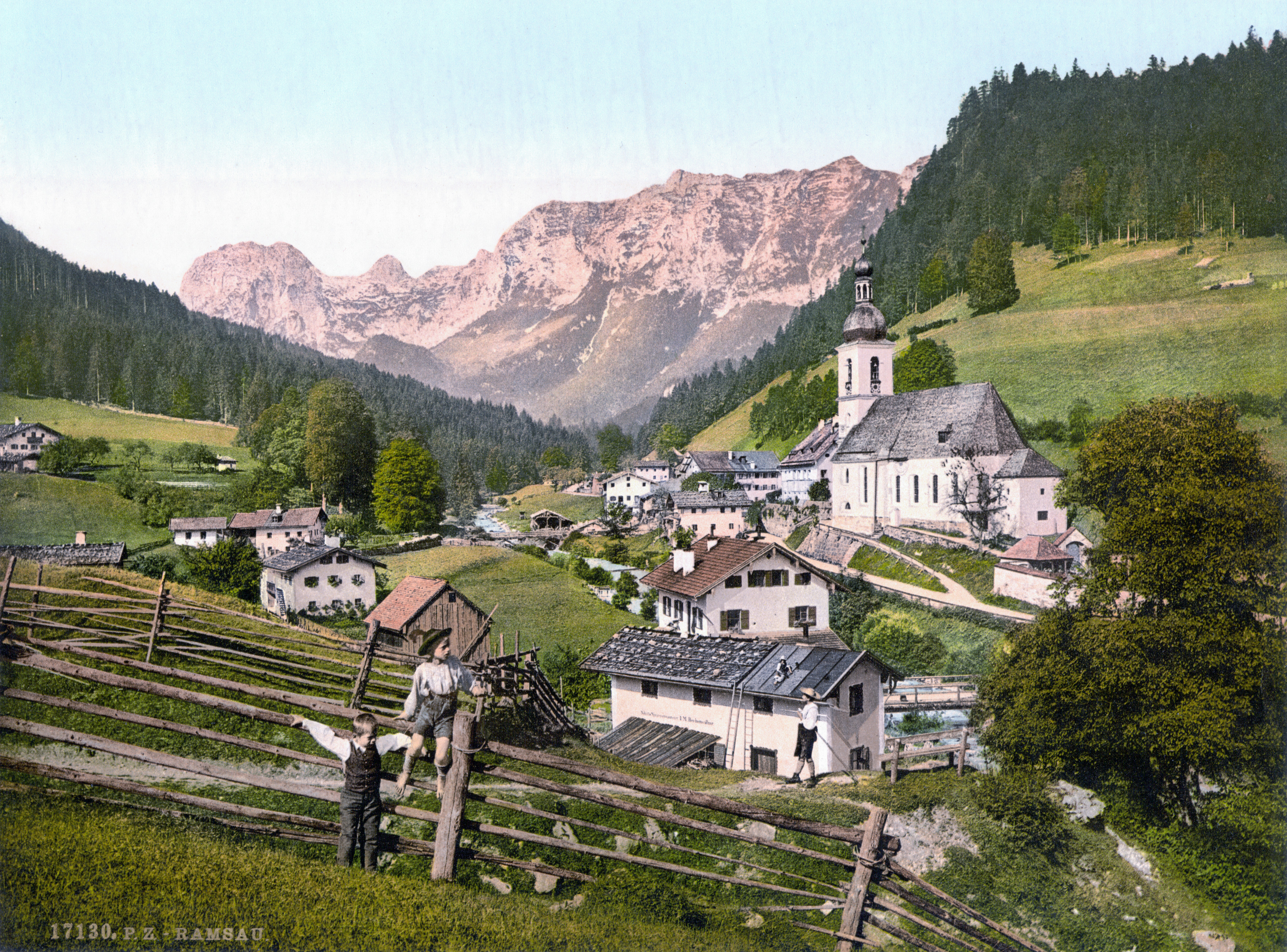 Ramsau